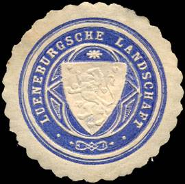 Sealing stamp Title: Lueneburgische Landschaft - Lüneburg Description: blau, weiß, geprägt Place: size: 3 cm